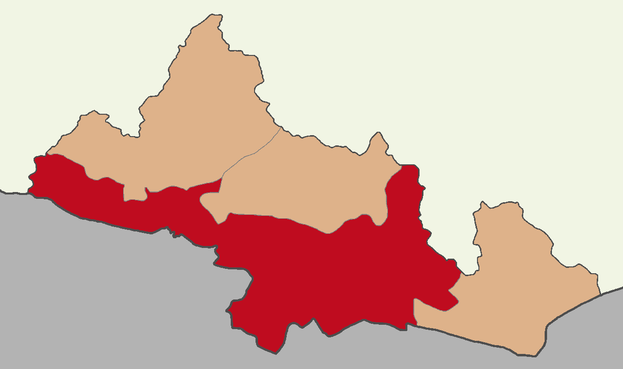 Kilis Merkez ilçesinin konumu